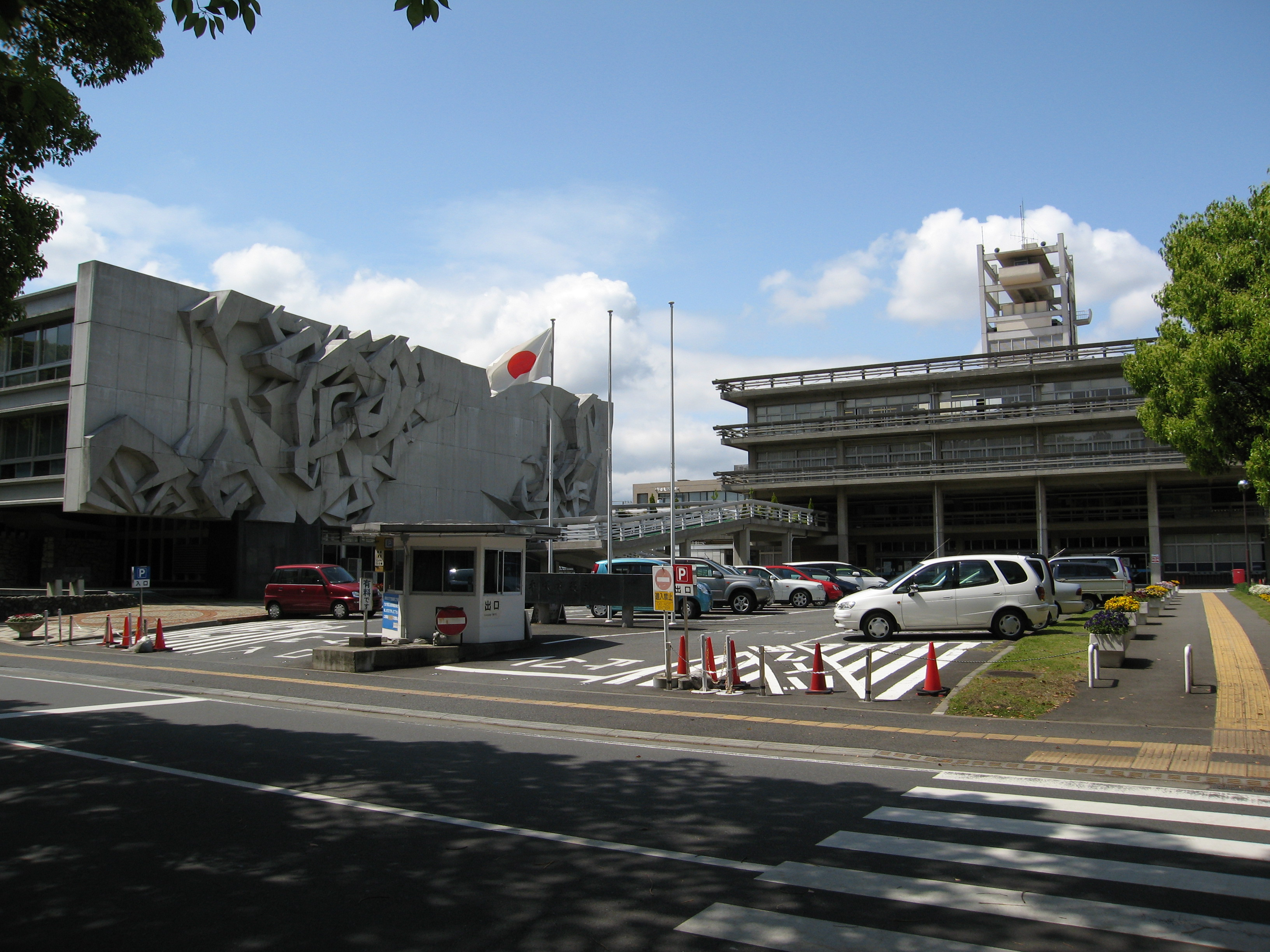 "Hiratsuka city hall" Kanagawa , Japan